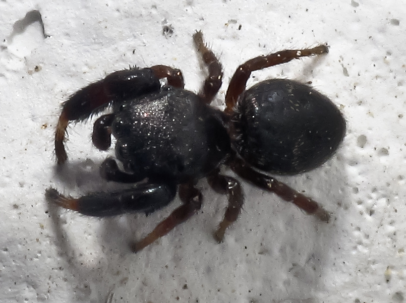 Araña (Sibianor sp.) en Bastavales, Brión, Galicia Spider, Bastavales, Brión, Galicia